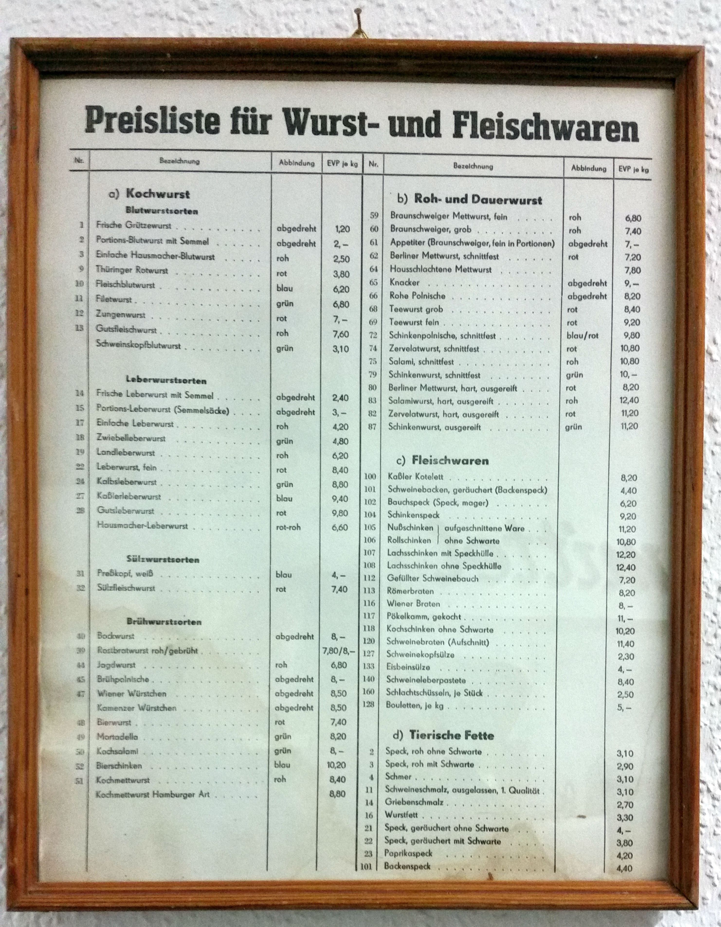 Preisliste für Fleisch- und Wurstwaren aus einem DDR-Konsum im DDR-Museum Pirna